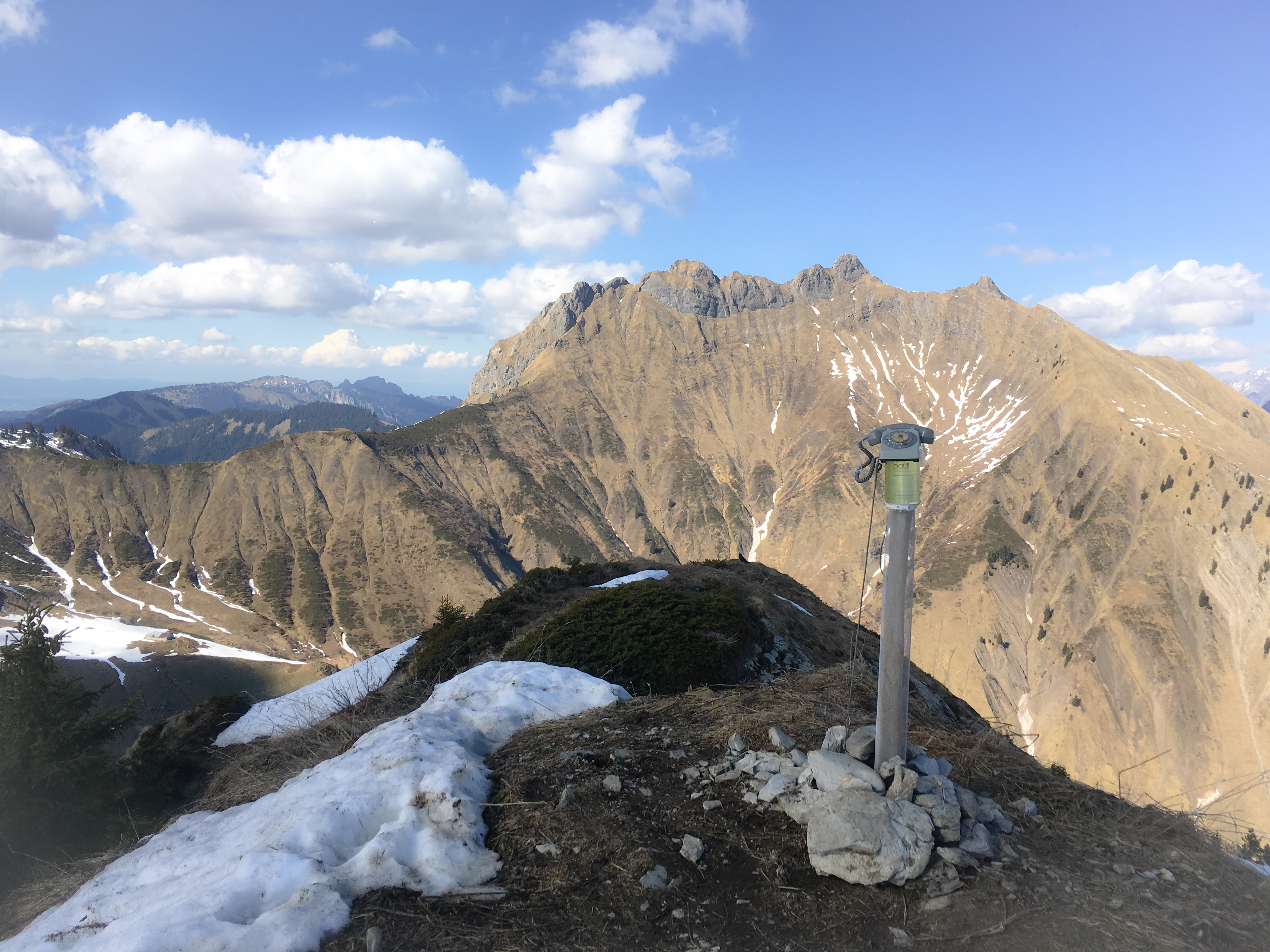 Vue depuis le sommet de la pointe d'Uble, et de l'installation réalisée par l'artiste Grégoire Falque pour la Commune.